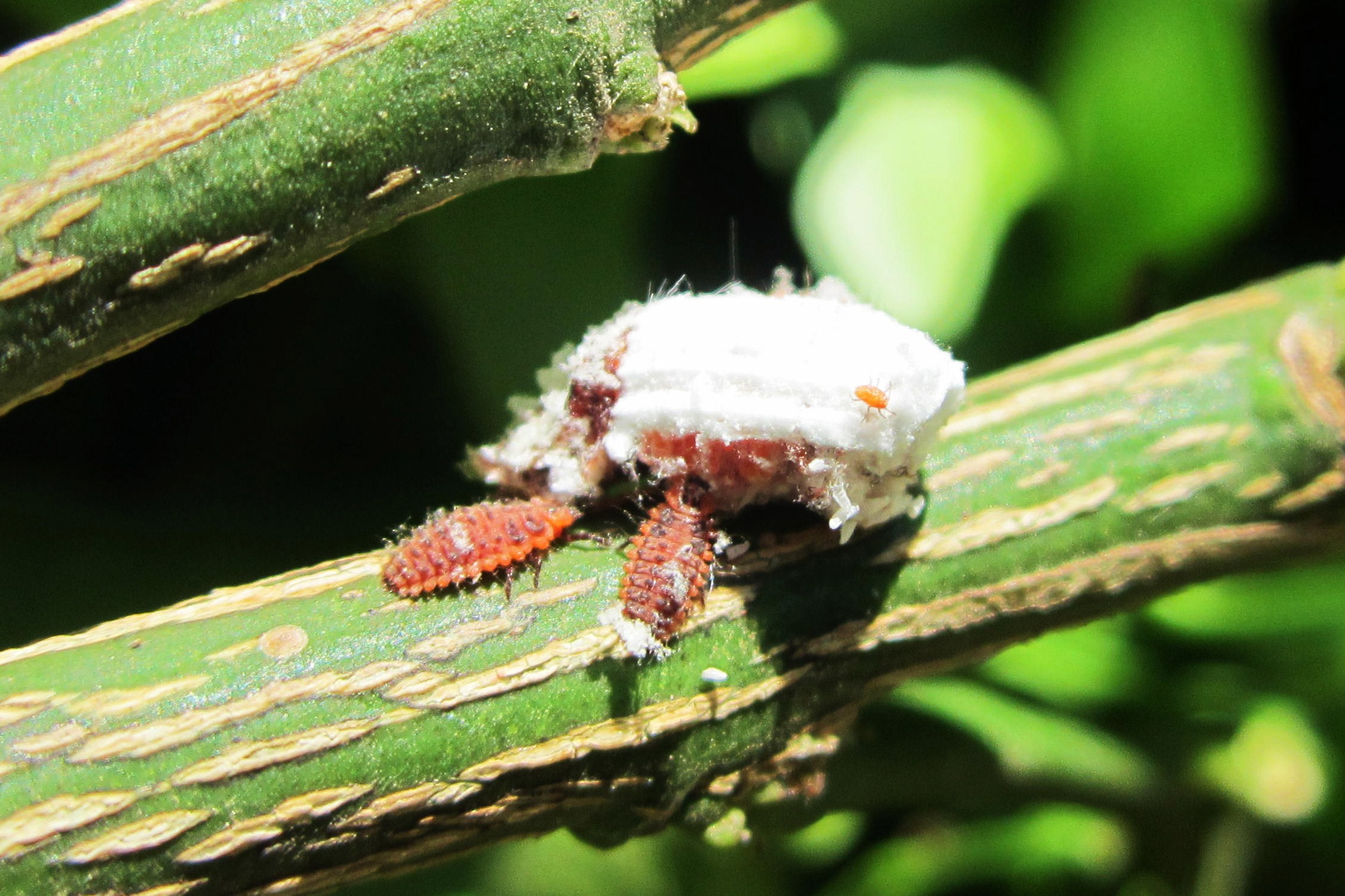 Larvas de Rodolia cardinalis alimentándose de Icerya purchasi